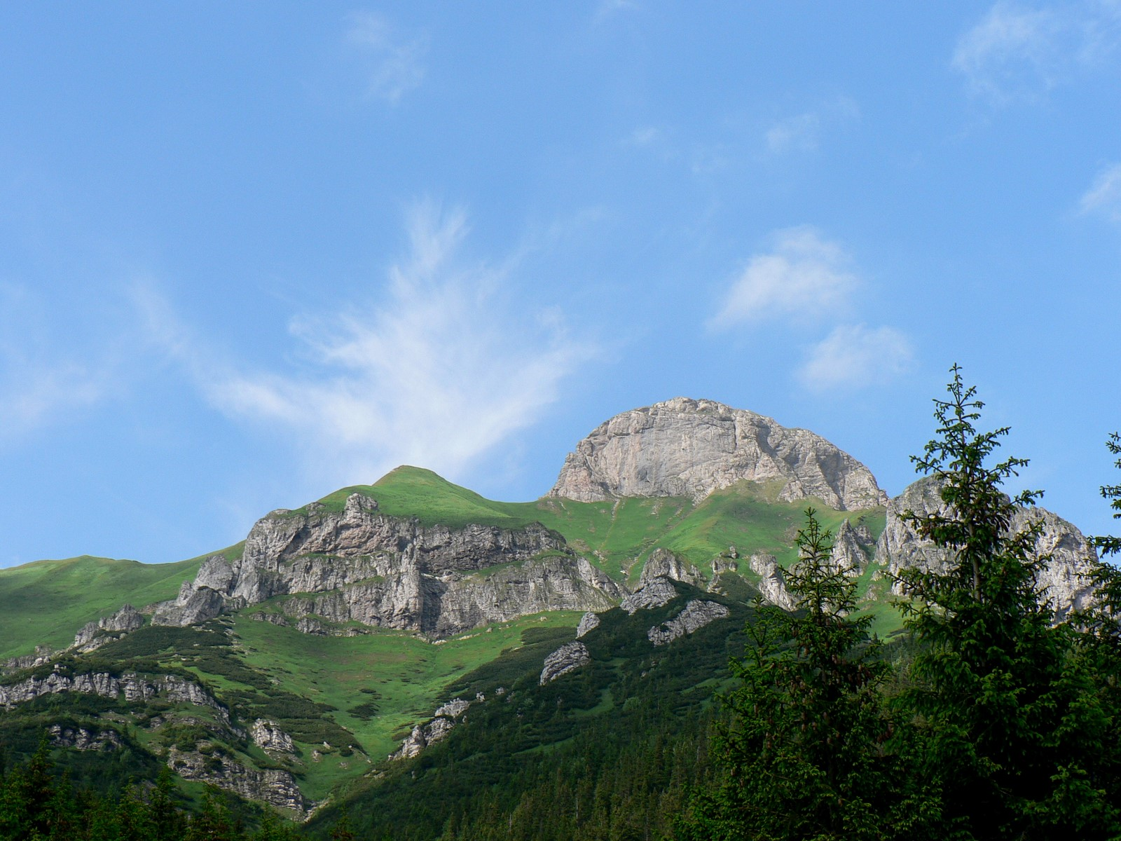 Widok na Płaczliwą Skałę z Doliny Zadnich Koperszadów